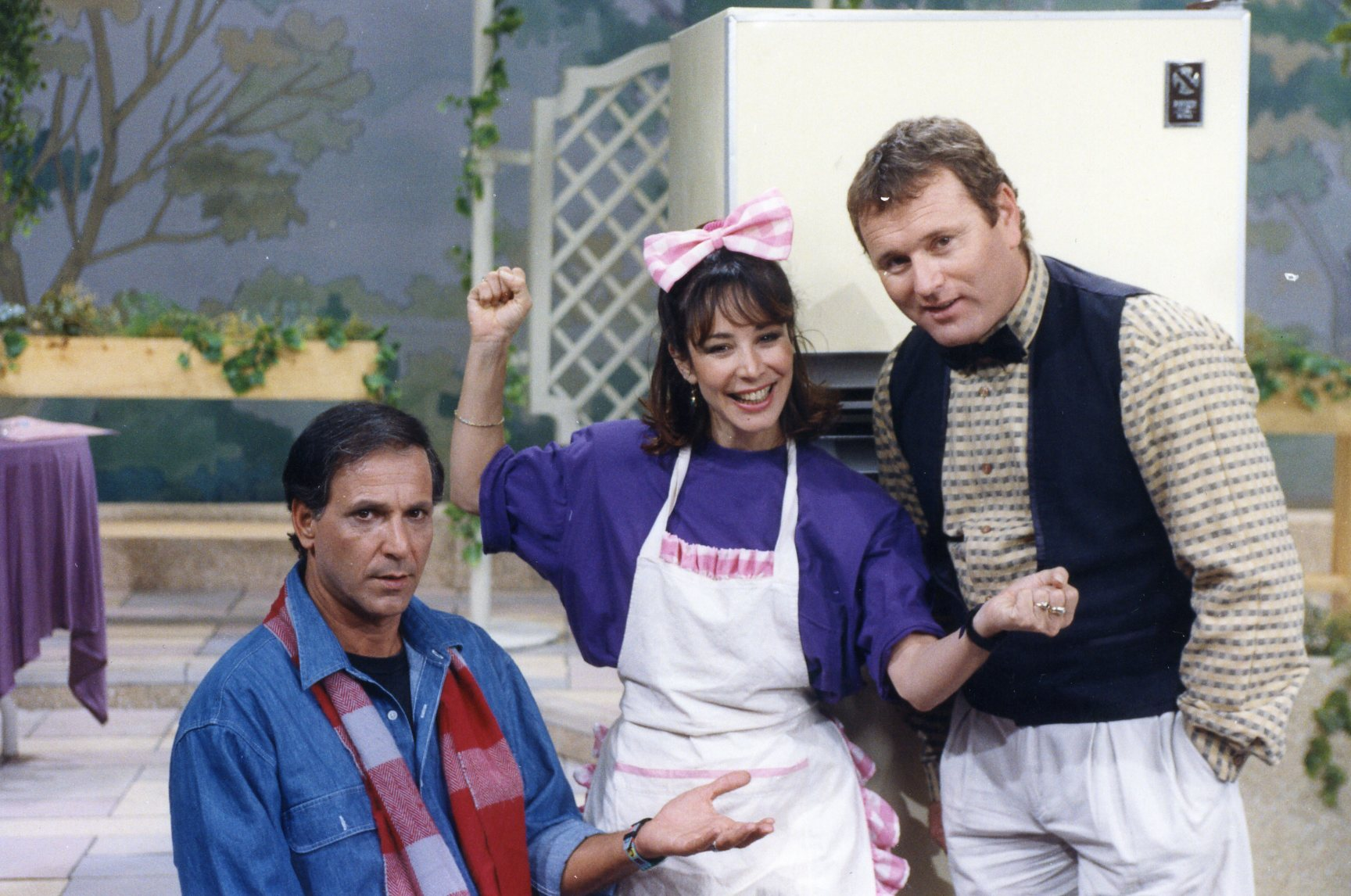 בלי סודות הייתה תוכנית טלוויזיה לימודית, אשר שודרה בטלוויזיה החינוכית הישראלית באמצע שנות השמונים, בהמשך בגלל הפופולריות הגדולה נוצרה תוכנית המשך, "בסוד העניינים", אשר הופקה בשנים 1991-1992.